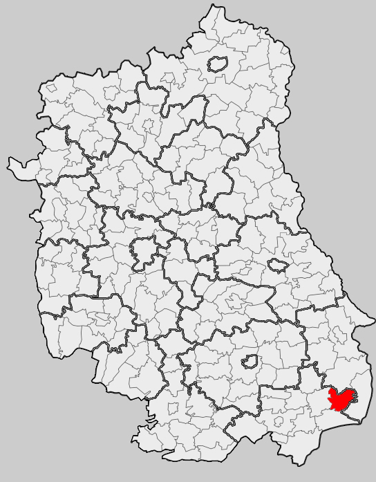 Map of gmina Telatyn, Tomaszów Lubelski county, Lublin voivodship Mapa gminy Telatyn, powiat tomaszowski, województwo lubelskie